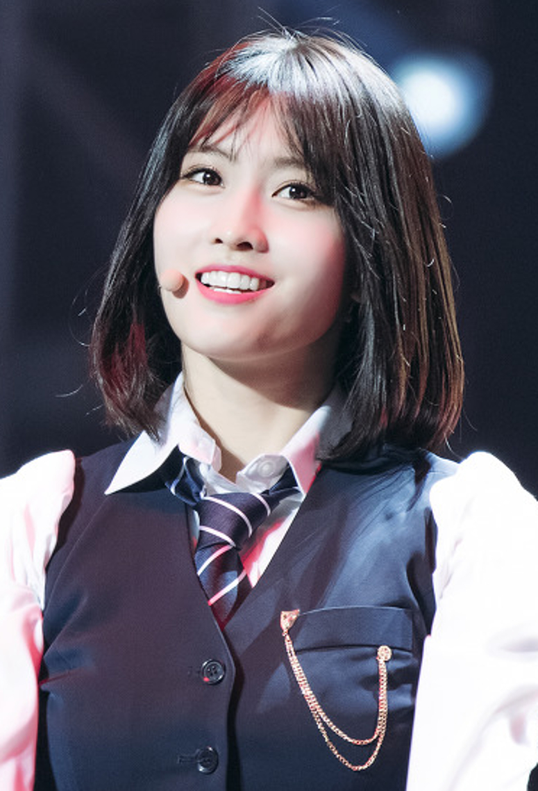 180519 트와이스랜드 마지막 날 (모모)